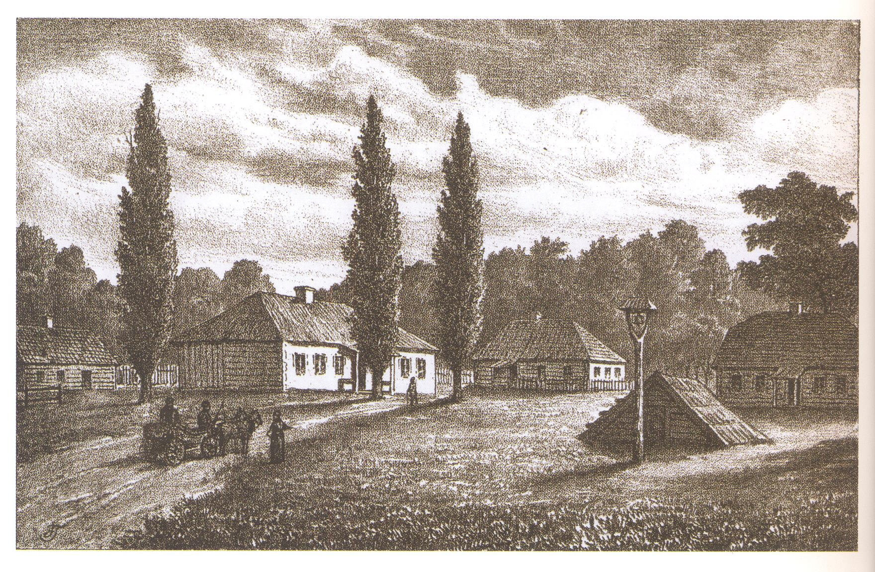 Беларуская (тарашкевіца): Хараўшчына (Charaŭščyna), сядзіба Карпінскіх (Karpinski)